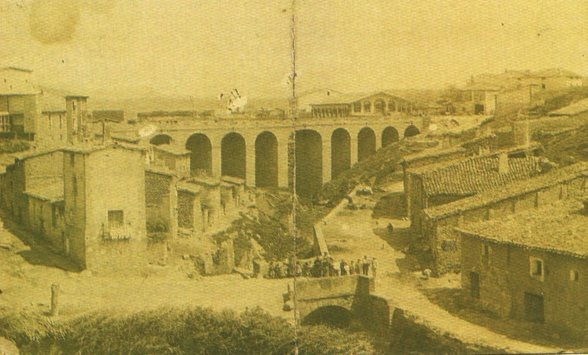 Puente de Cenicero (La Rioja), principios del siglo XX.